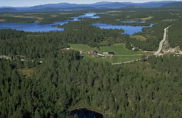 Motiv: Myskelåsen Nyckelord: Flygbilder, Riksintressen Kategori: Skogslandskap, Nybyggargård/fjällägenhet Myskelåsen